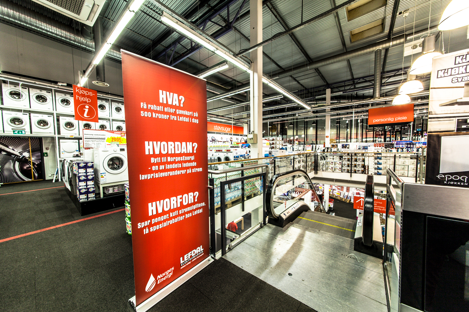 Lefdals varehus på Alnabru utenfor Oslo